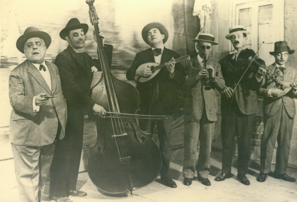 foto di mia proprietà della Musica dei ciechi di Raffaele Viviani del 1928